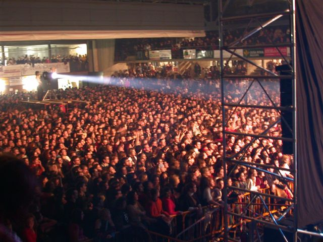 Público en el último concierto de los Ja t'ho diré en Ciutadella, 2004